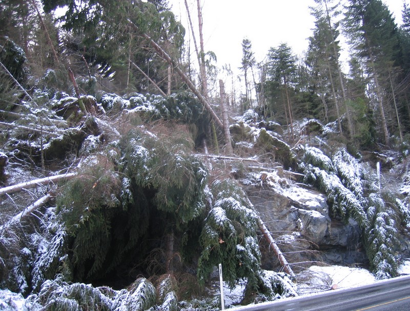 Ekstremveret Dagmar har herja i granfelt